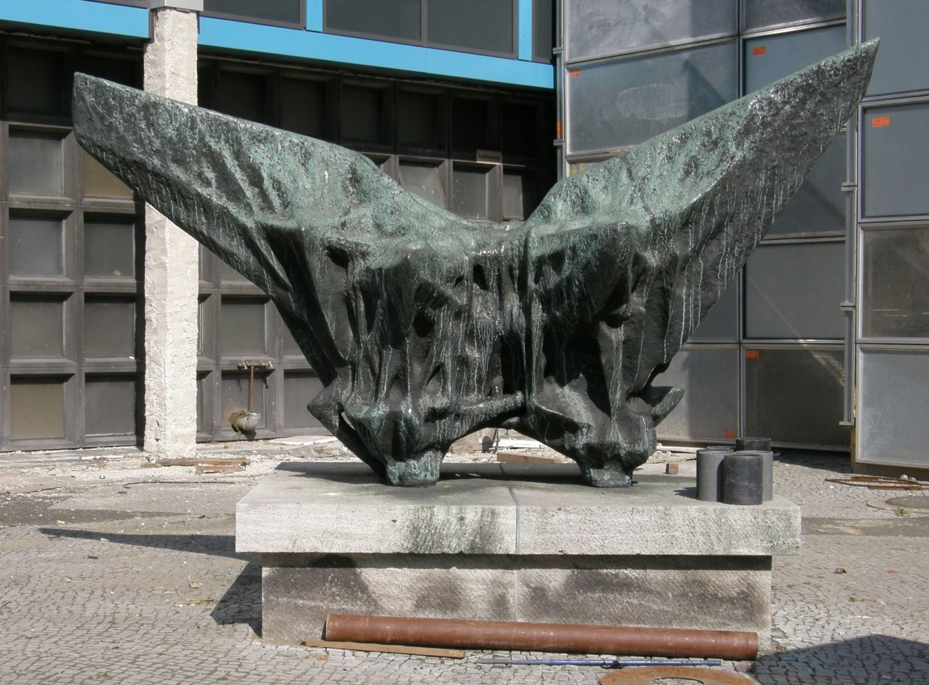 Karl Hartung: Wachsende Flügel (Kristalline Form). 1960-62, Bronze. Hardenbergstraße Ecke Ernst-Reuter-Platz, Berlin-Charlottenburg.